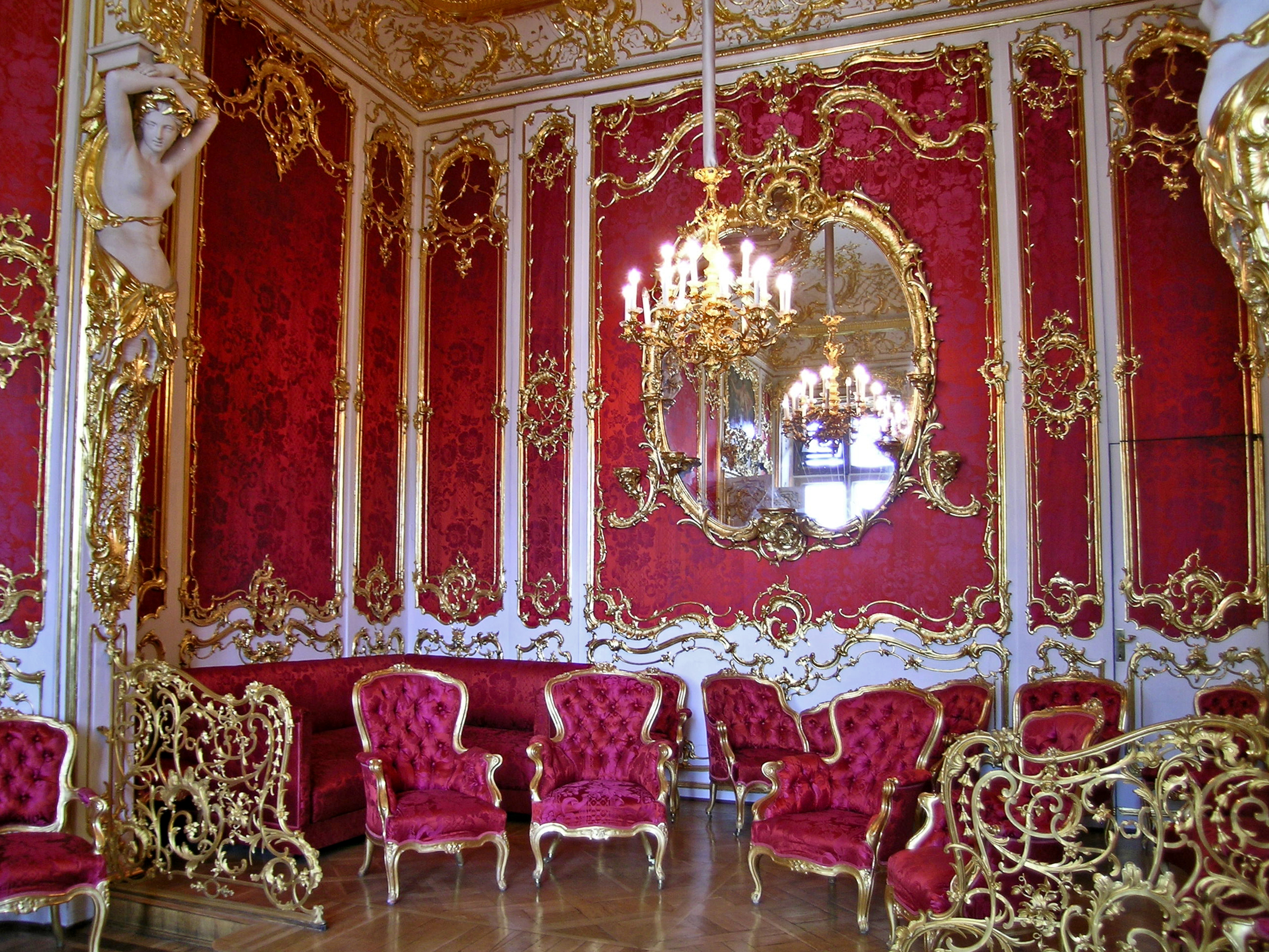 Boudoir der Kaiserin Marija Alexandrowna im Winterpalais in der Eremitage, St. Petersburg